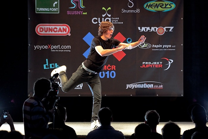 Soutěžící na Yoyo MČR 2010.